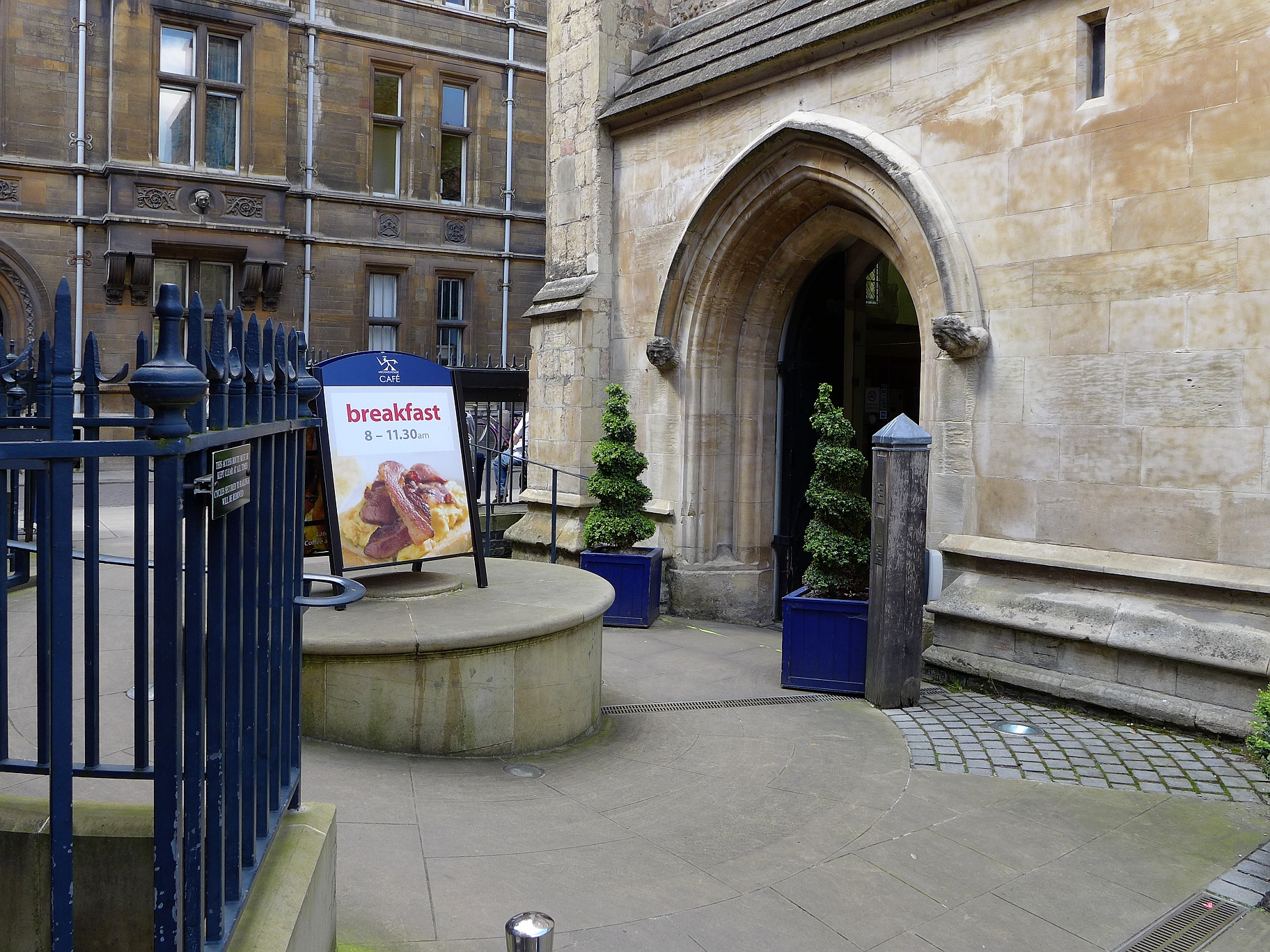 Eingang zum Michaelhouse Café in der St Michael's Church auf der Trinity Street in Cambridge.